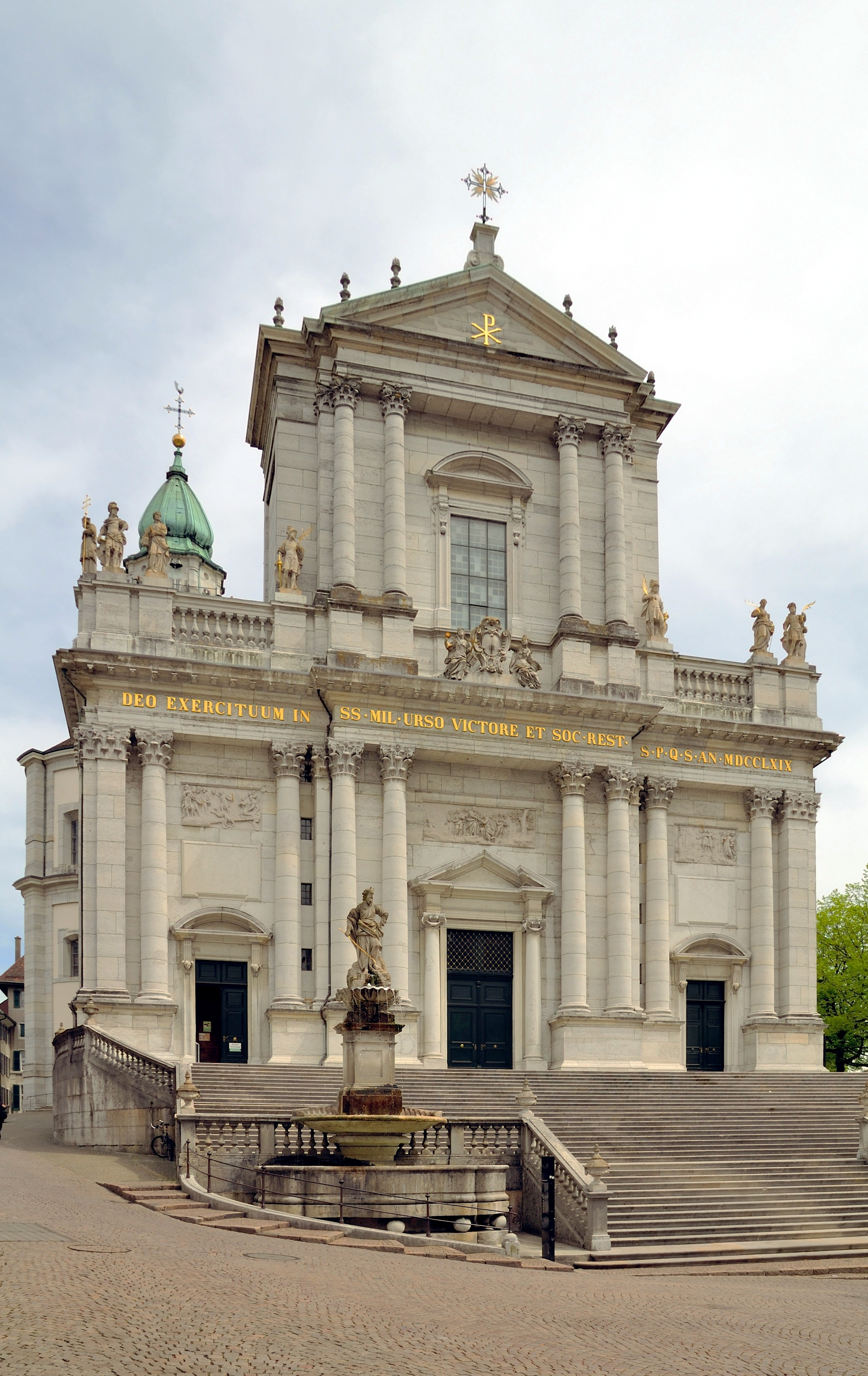 Solothurn: St. Ursenkathedrale von Westen mit Freitreppe